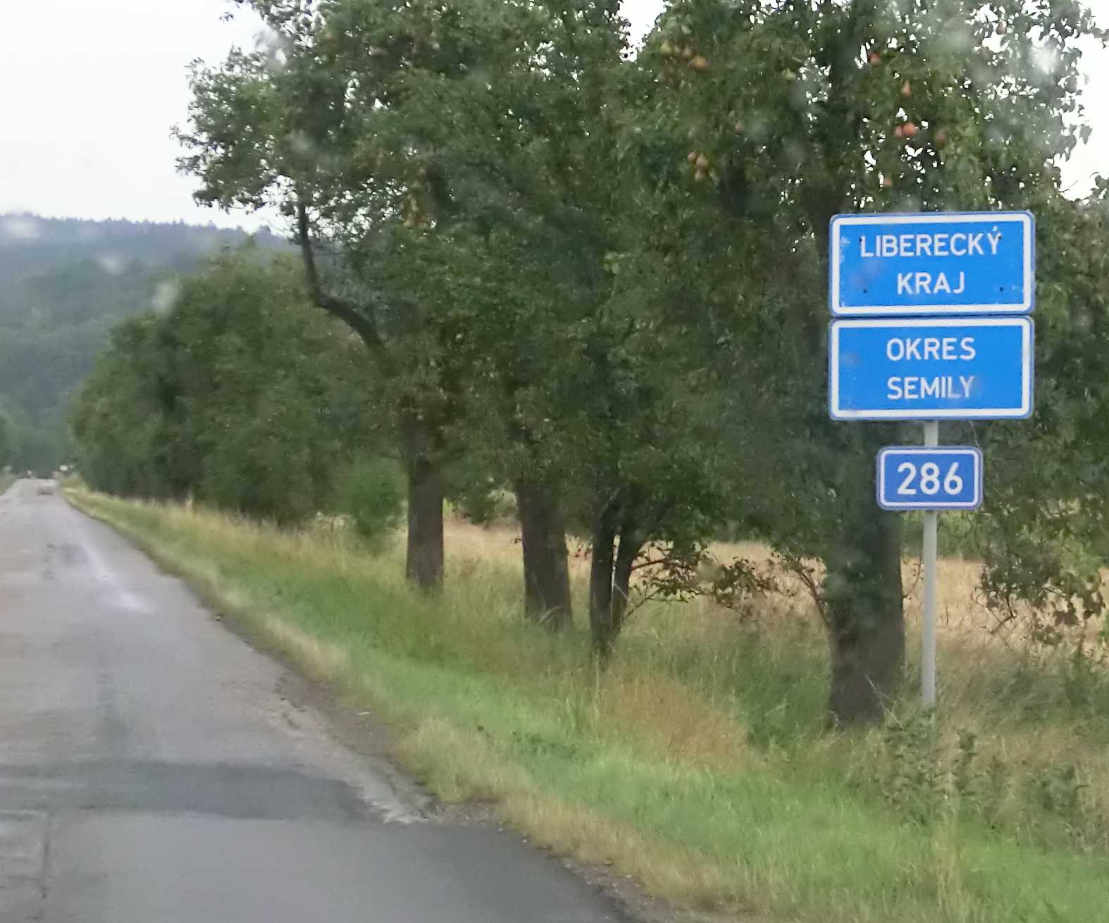 Silnice II/286 přechází z Královéhradeckého do Libereckého kraje a zjevně se mění kvalita povrchu.